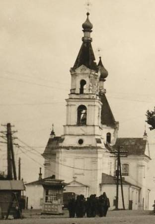 Беларуская (тарашкевіца): Невель (Nieviel), рог пляцу Рынку (plac Rynak) і вуліцы Юраўскай (vulica Juraŭskaja). Прачысьценская саборная царква